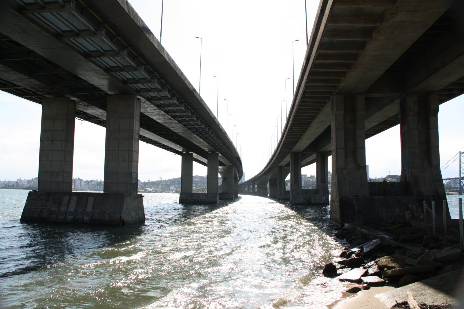 Ponte Colombo Machado Salles e Pedro Ivo Campos/ Florianópolis SC